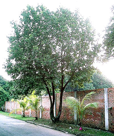 Pokok Medang Teja. Biasanya ditanam sebagai pokok taman dan ditepi jalanraya. Menggunakan kamera GrandVision EZshot E32 dengan resolusi 800x600 piksel pada 20 May 2005 di Ayer Keroh, Melak